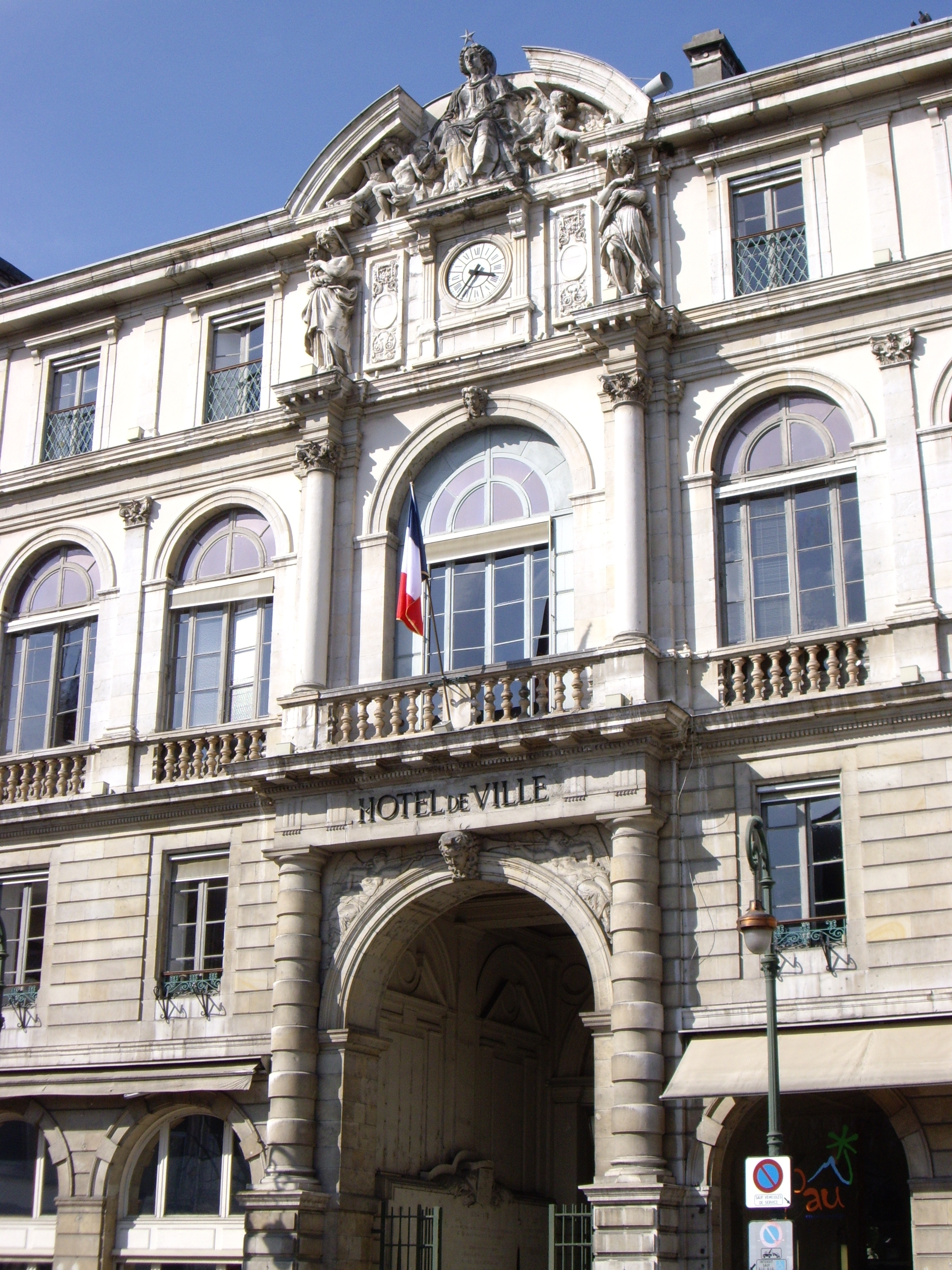 Hôtel de ville de Pau (64)